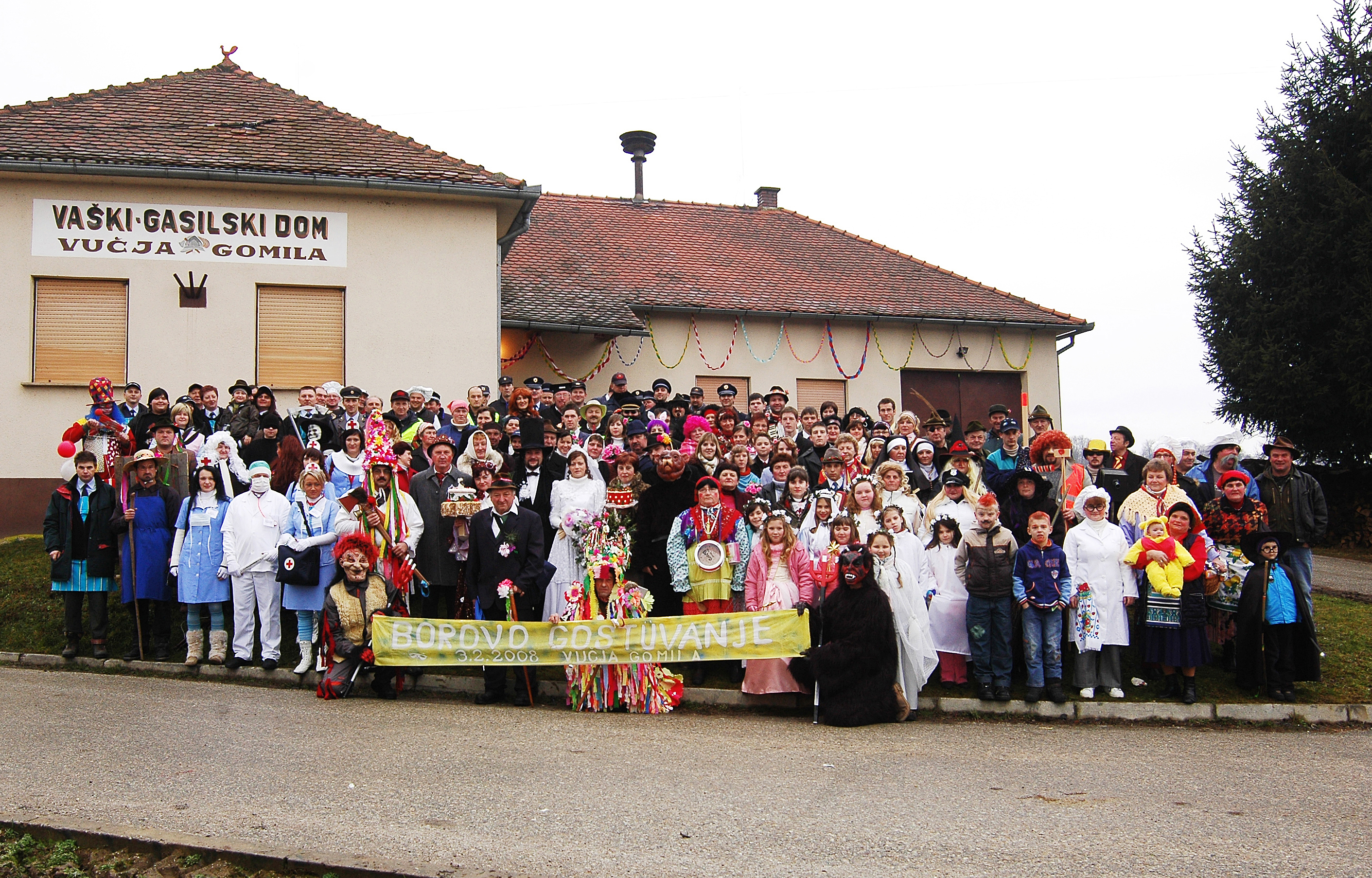 Borovo gostüvanje v Vučji Gomili februarja 2008.